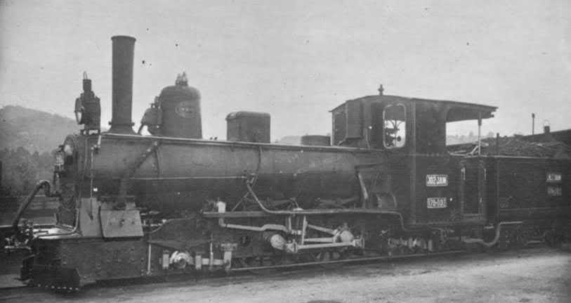 Srpski (latinica): Na slici gore lokomotiva 178-002